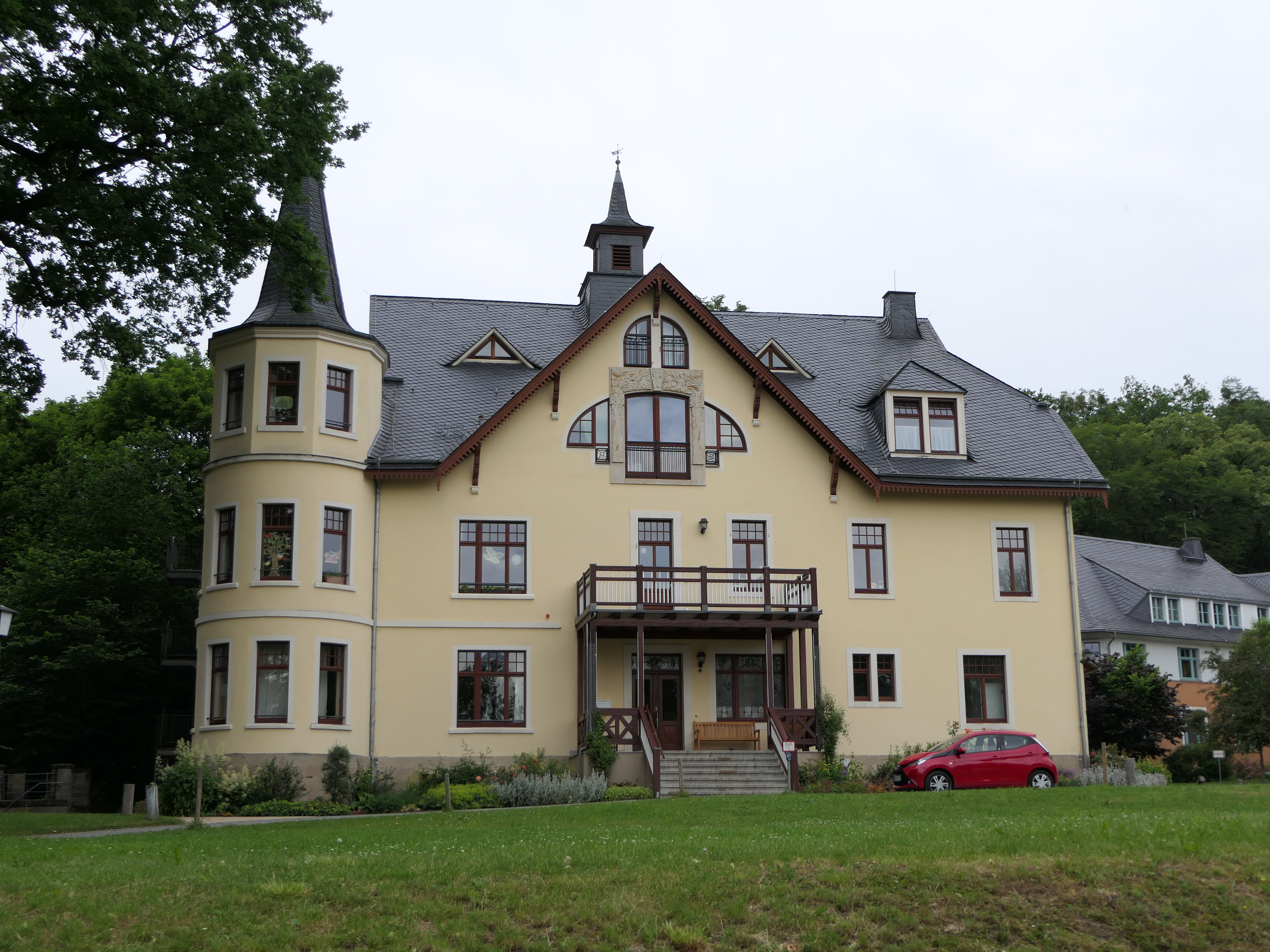 Heilpädagogische Schule Bonnewitz